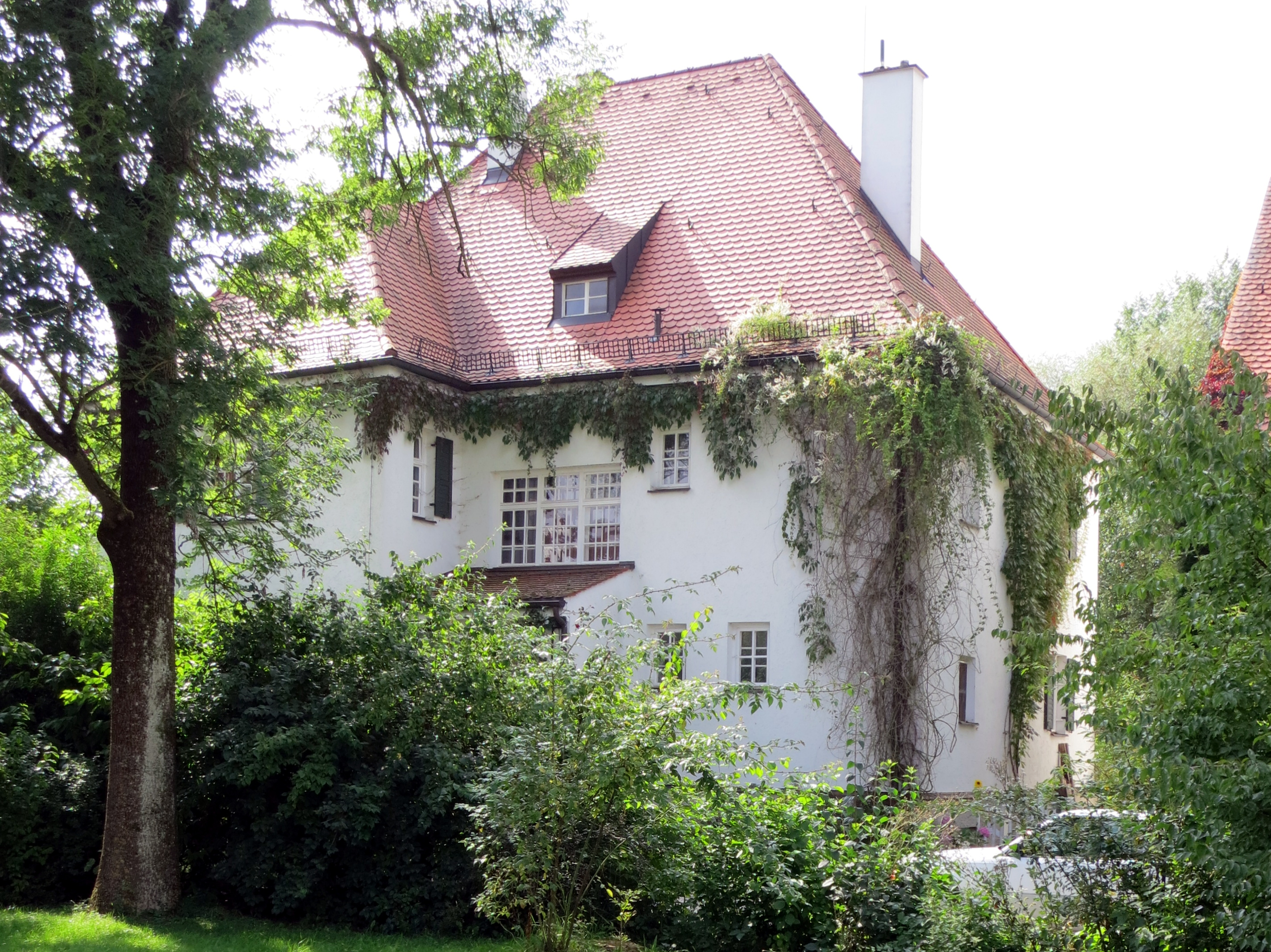 Pfarrhof in Pipinsried, drei Gebäude um gemeinsamen Hofraum angeordnet; Pfarrhof aus Ost